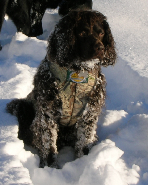 Chien d'eau americain